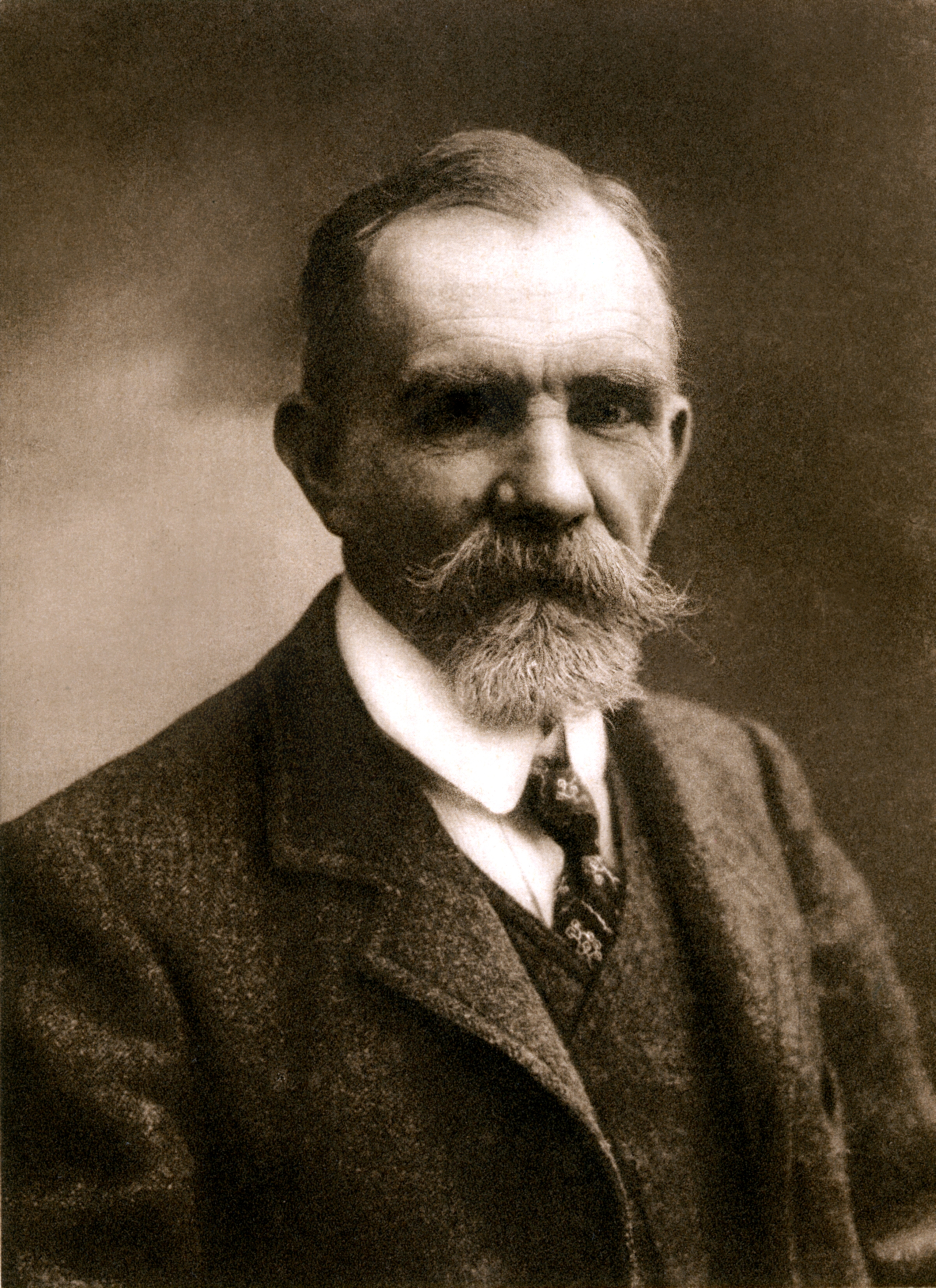 Eugène Simon est un arachnologiste français, né le 30 avril 1848 à Paris et mort le 17 novembre 1924.